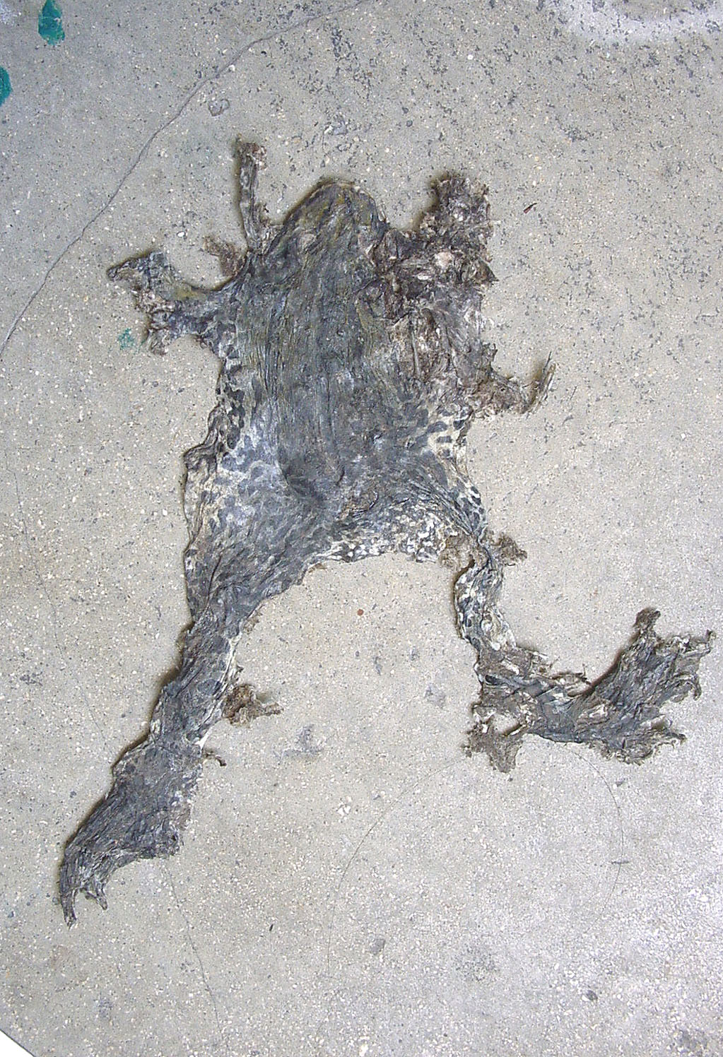 reste de cadavre de grenouille écrasée. Les amphibiens comptent parmi les espèces les plus souvent victime de roadkill. Et encore ne détecte-t-on que les adultes. Les jeunes de l'année au printemps étant à peine visible. Les écoducs destinés à leur permettre de traverser une route sans danger sont dits "batrachoduc" ou "crapauduc"